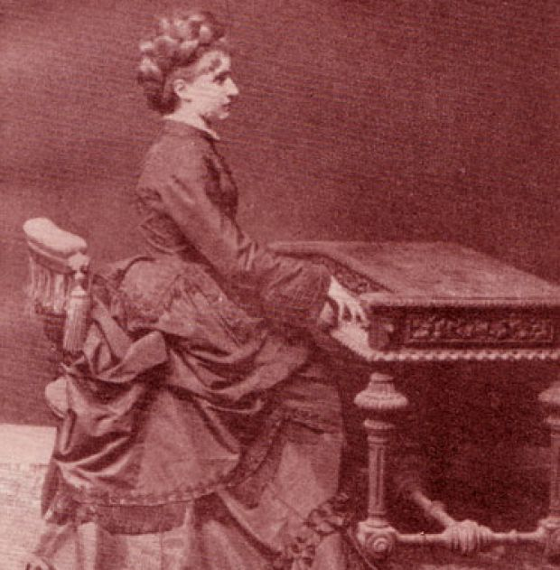 Српска пијанисткиња Јованка Стојковић (1852-1892)